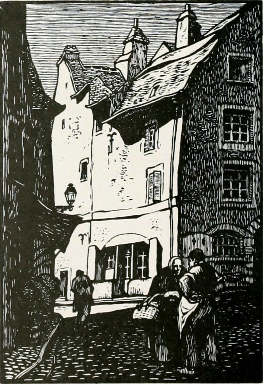 La Rue des Juifs à Nevers, gravure